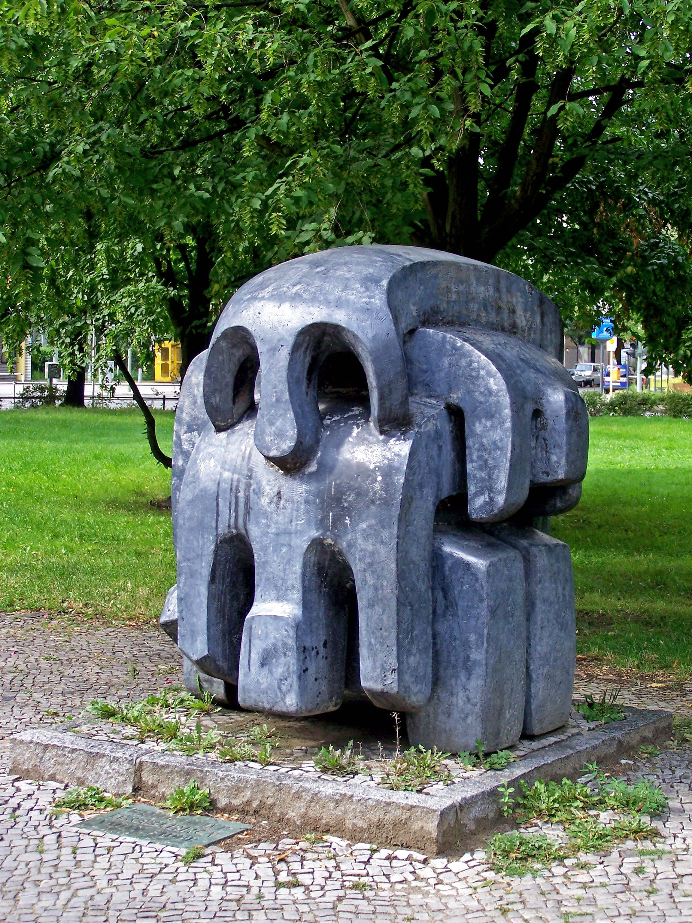 Denkmal: Vadim Sidur "Treblinka" (1966), Amtsgerichtsplatz in Berlin-Charlottenburg/Berlin/Germany